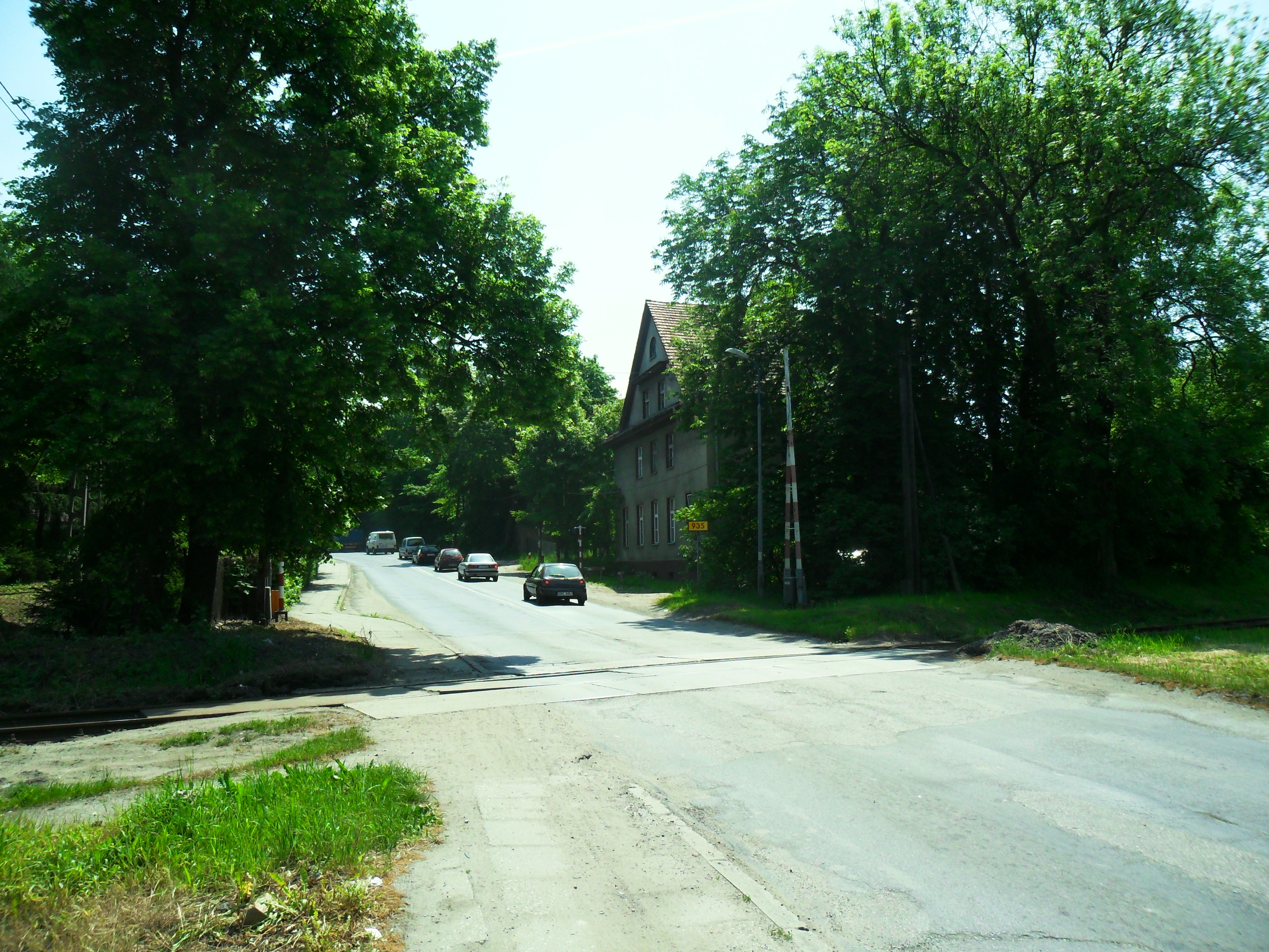 Przejazd kolejowy (z linią kolejową nr 176) na ulicy Rybnickiej (fragment drogi wojewódzkiej nr 935) w Raciborzu. W tym miejscu mieściło się w latach 1922–1939 polsko-niemieckie przejście graniczne pomiędzy Raciborzem (wówczas Ratibor po stronie niemieckiej), a Brzeziem w Polsce (od 1927 roku pod nazwą Brzezie nad Odrą, dziś jest to dzielnica Raciborza; zdjęcie wykonane od strony Raciborza, widok w kierunku Brzezia). Szlakiem linii kolejowej (dziś normalnotorowej) przebiegała wówczas linia wąskotorowa z Raciborza do Gliwic. Granica przebiegała tuż za przejazdem kolejowym, tory znajdowały się po stronie niemieckiej. Tuż za granicą, po polskiej stronie przebiegał zaś tor bocznicy do Zakładów Chemicznych Ceres (obecnie Ema-Brzezie). Drzewo widoczne po lewej stronie zwane jest Lipą Piłsudskiego.